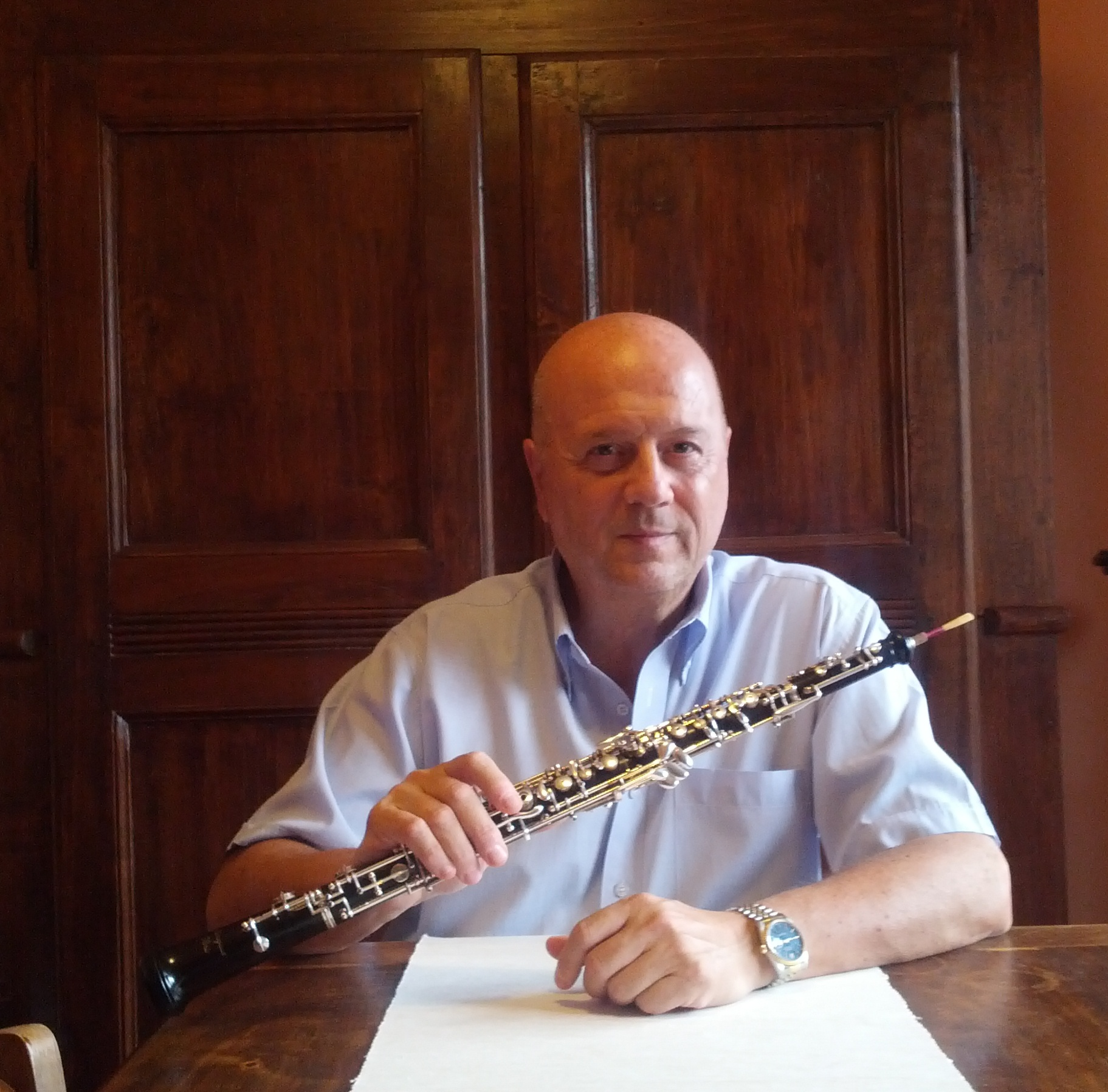 Carlo Romano - oboista